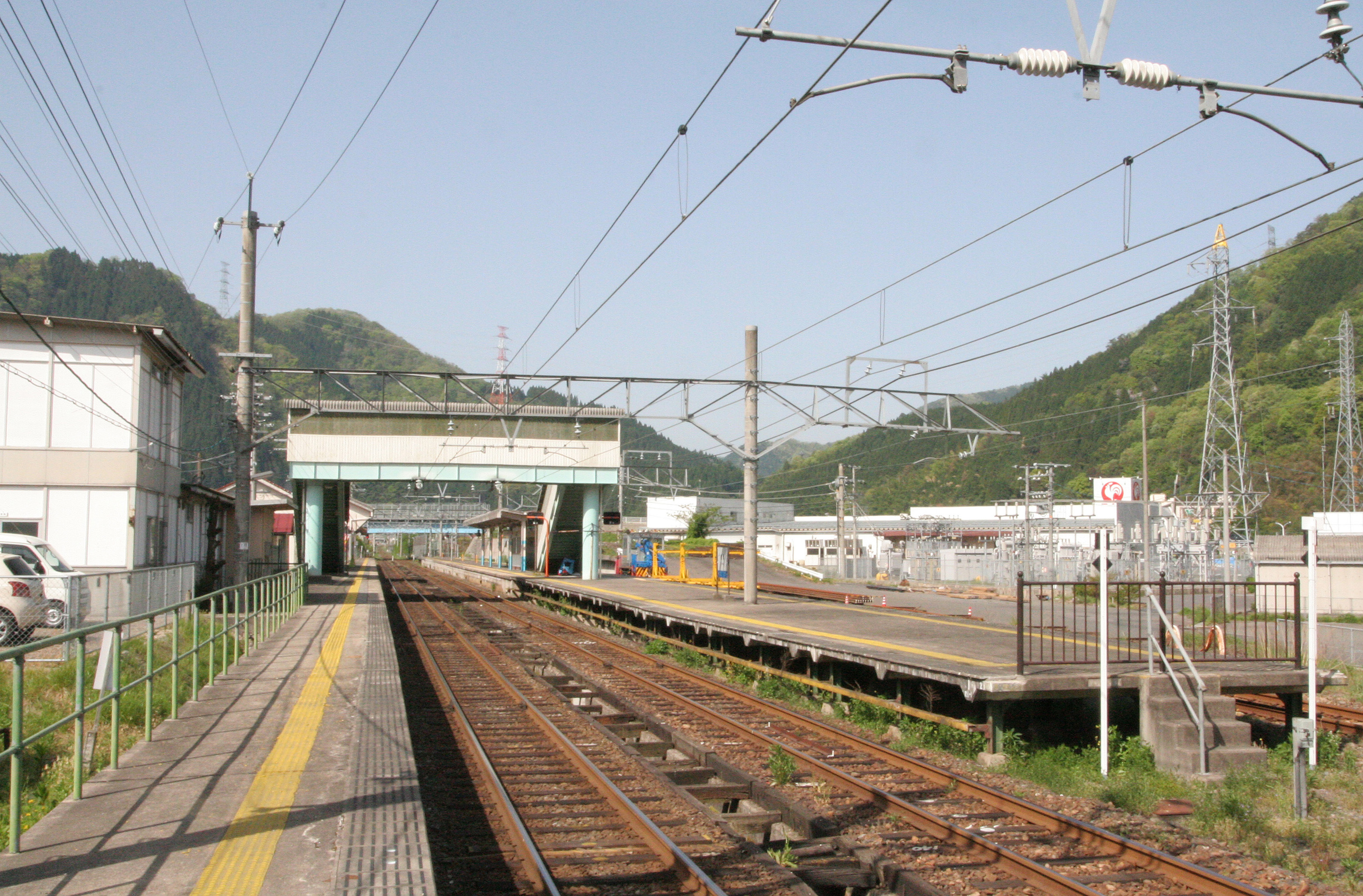 根雨駅の構内